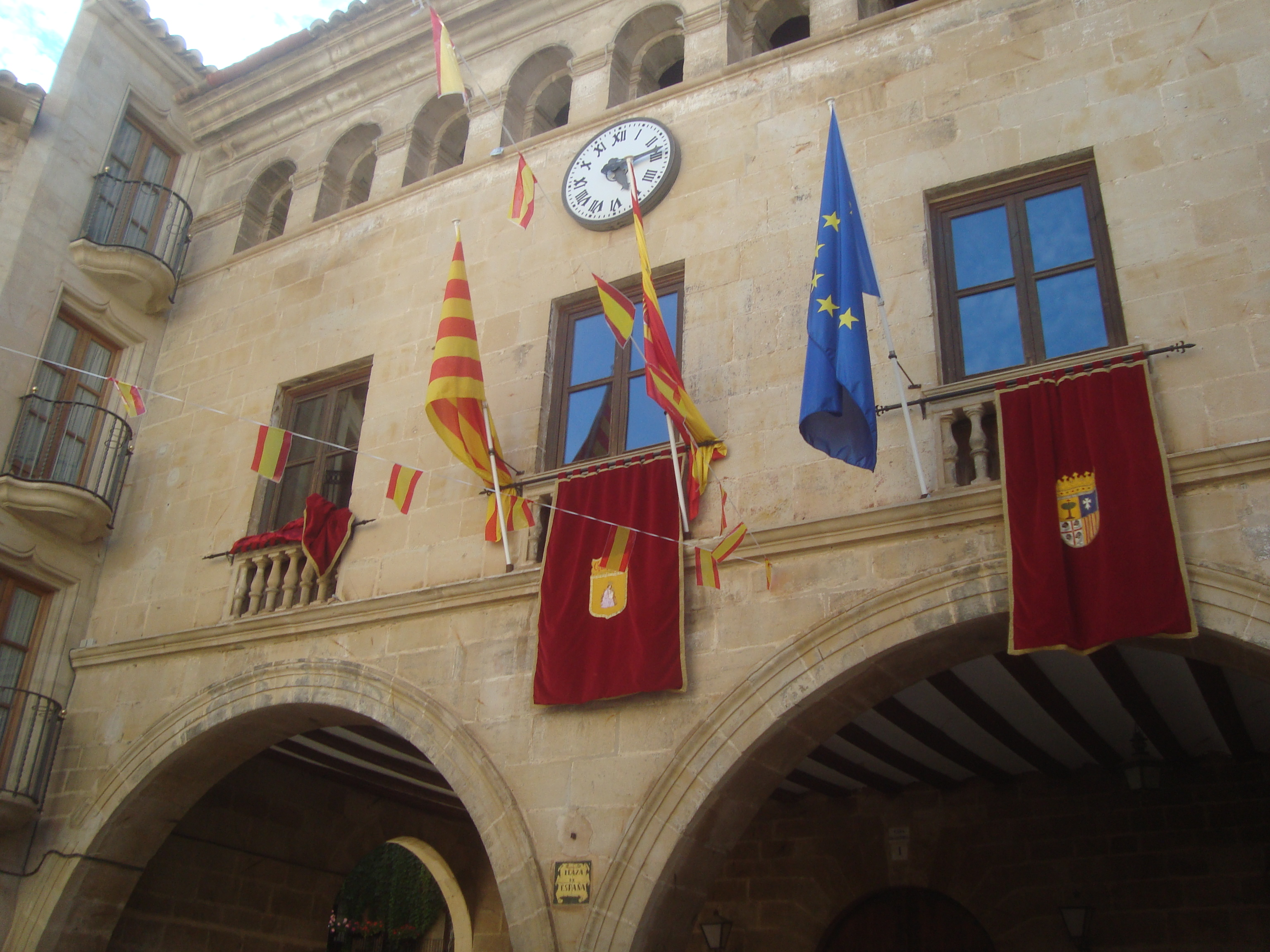 Ayuntamiento de Calaceite (Teruel)